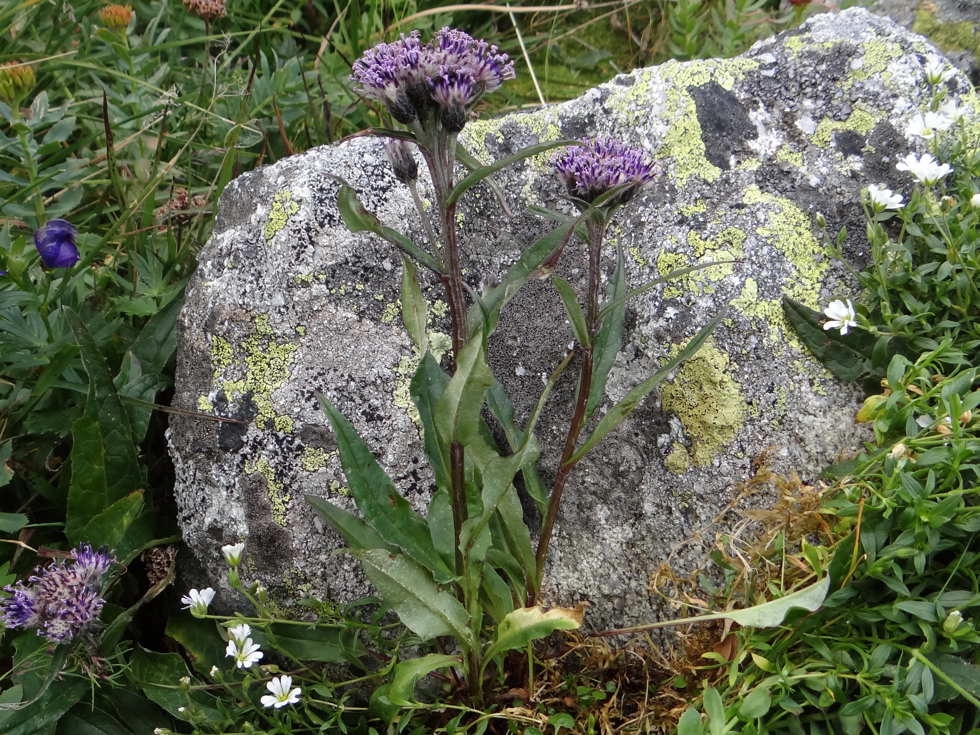 Une saussurée des Alpes (Saussurea alpina) dans la vallée de Mlynicka, dans les hautes montagnes des Tatras en Slovaquie.